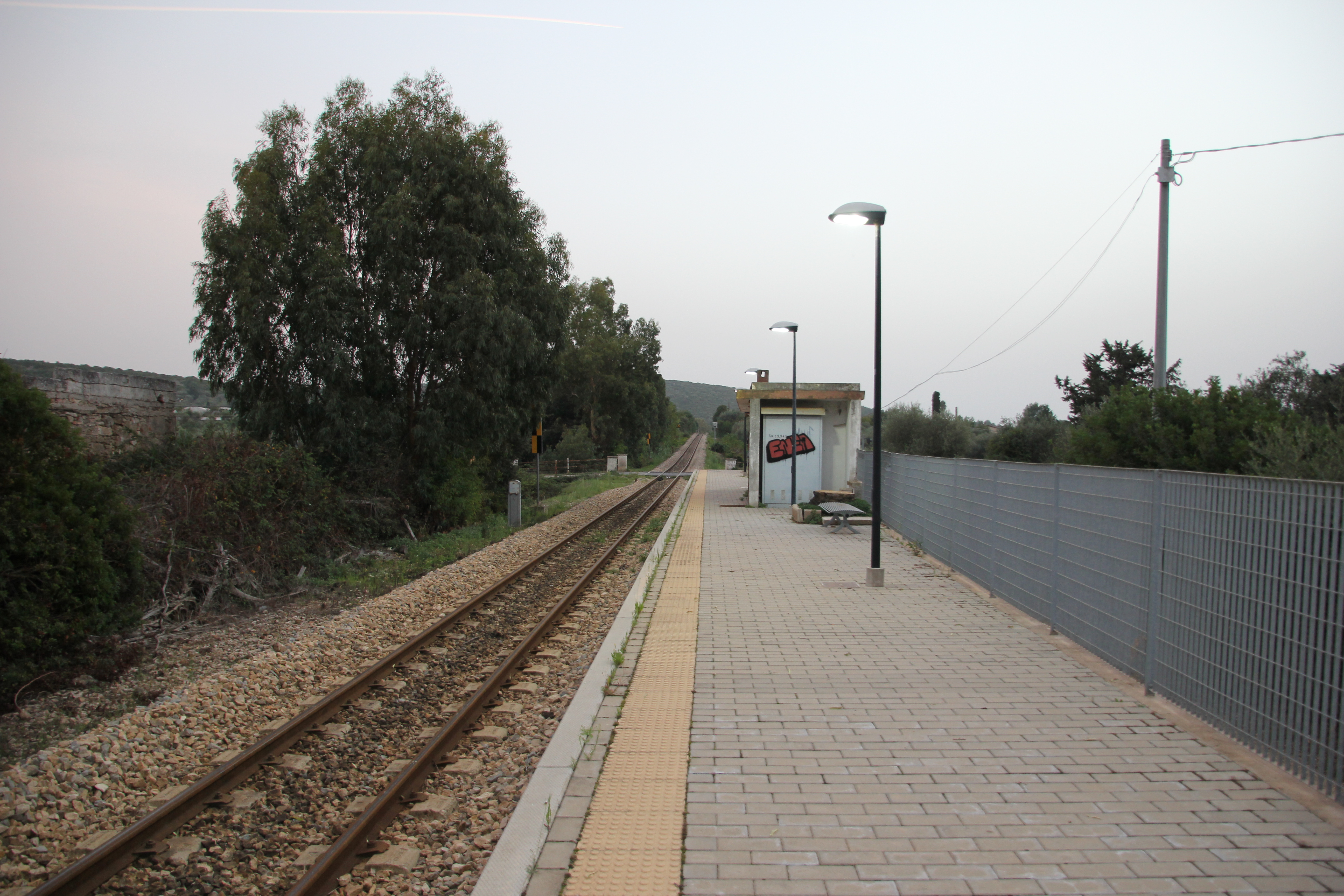 Alghero, stazione di Punta Moro